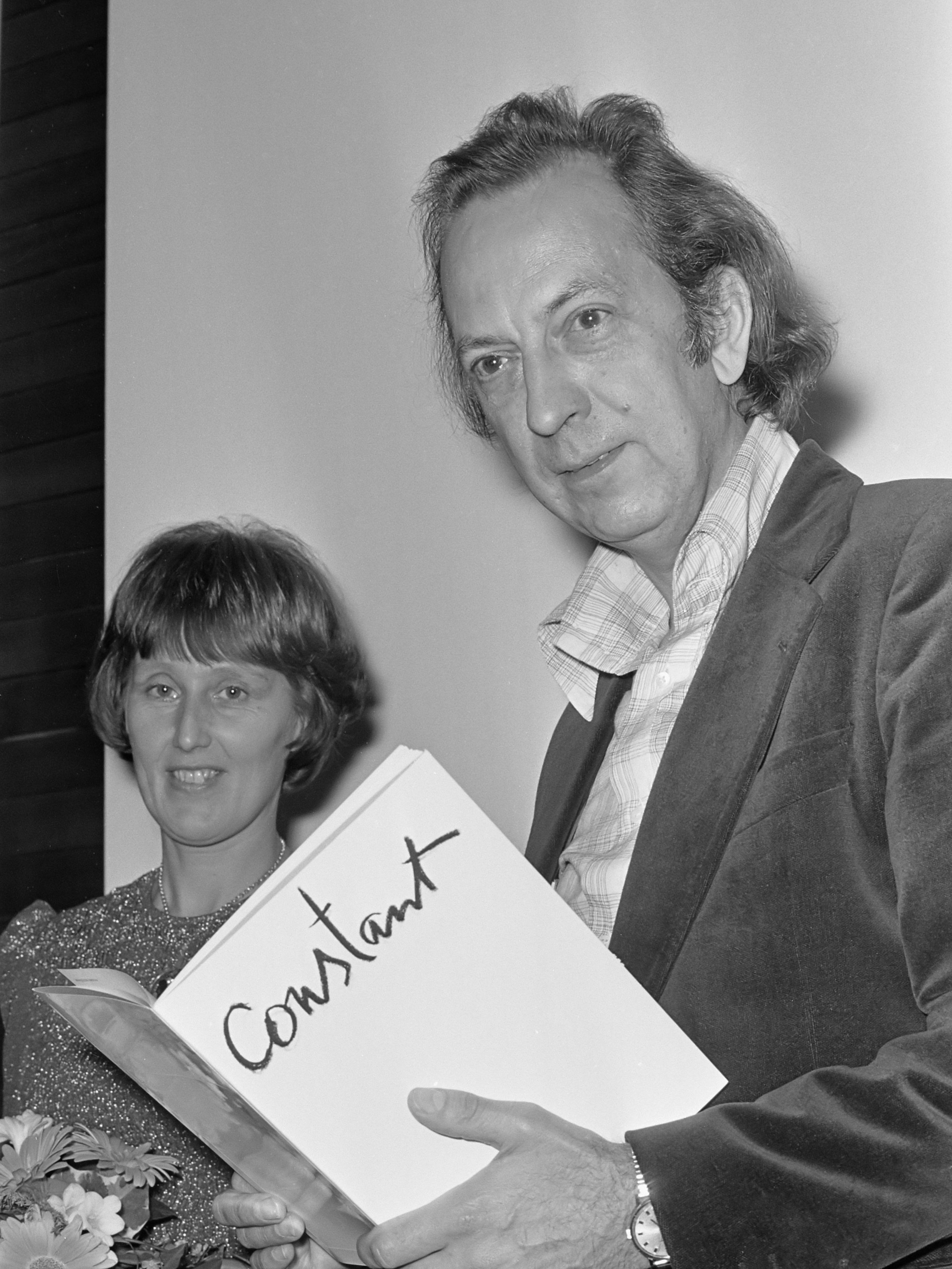 Constant Nieuwenhuis ontvangt David Roellprijs in Rijksmuseum (kop) 28 november 1974